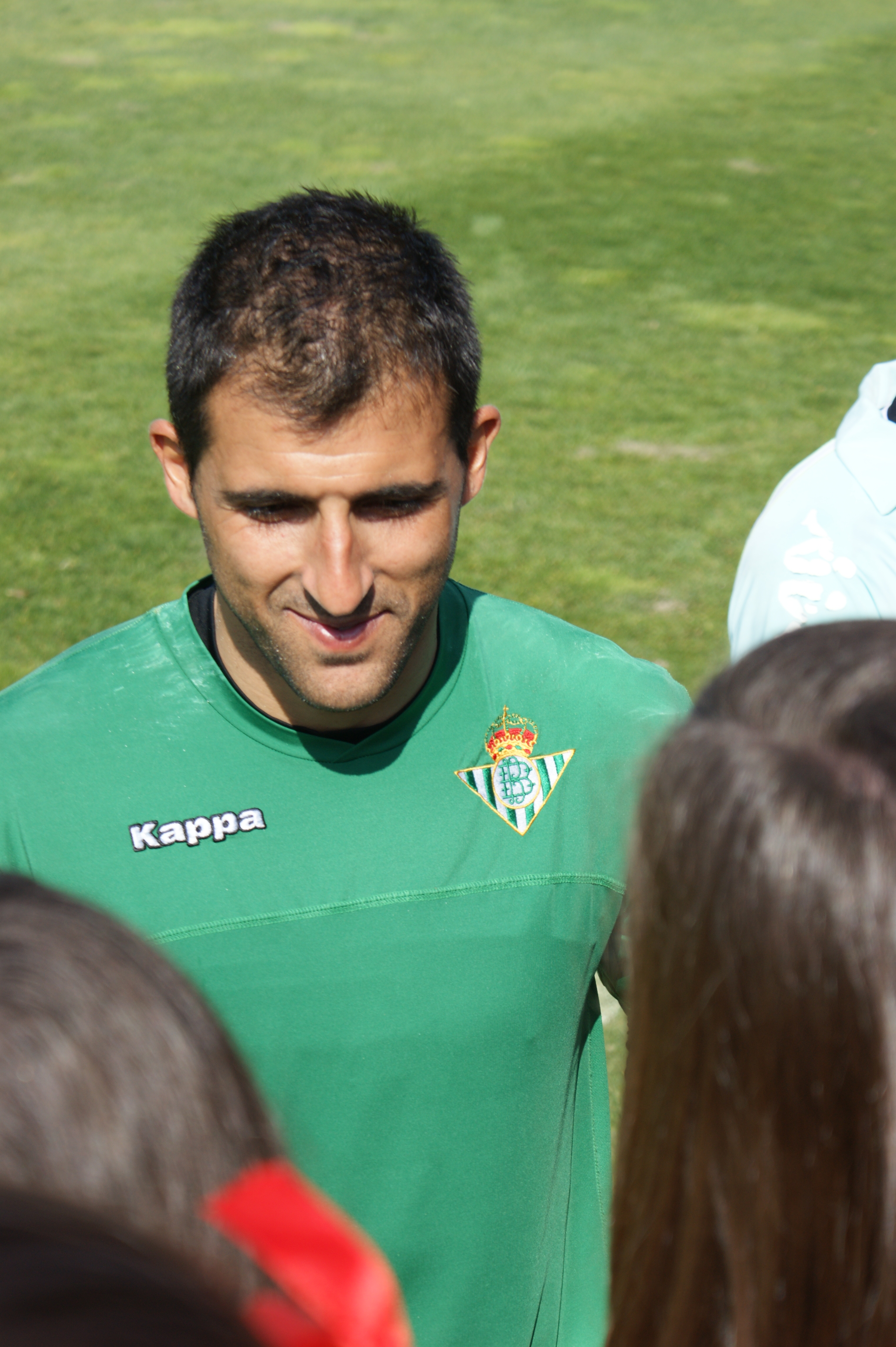 Ricardo Alexandre Martins Soares Pereira entrenando en la ciudad deportiva "Manuel Ruiz de Lopera"